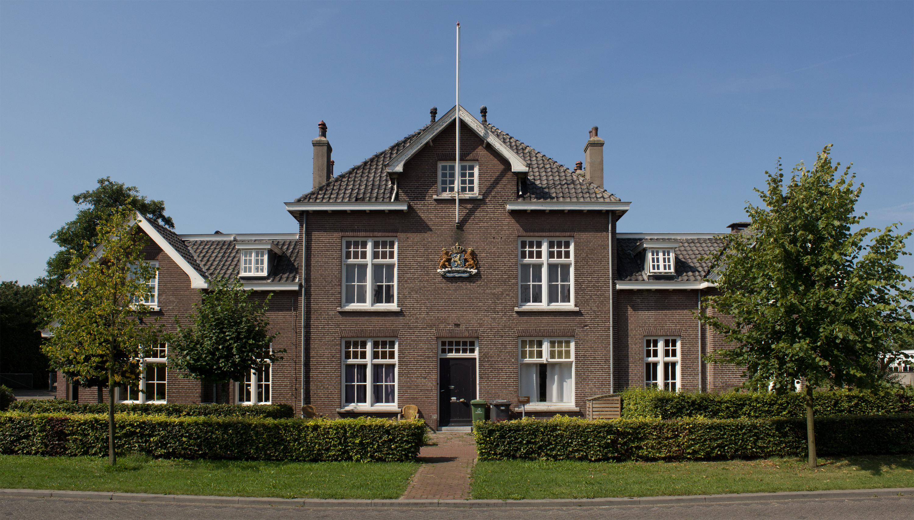 Marechausseekazerne te Alphen